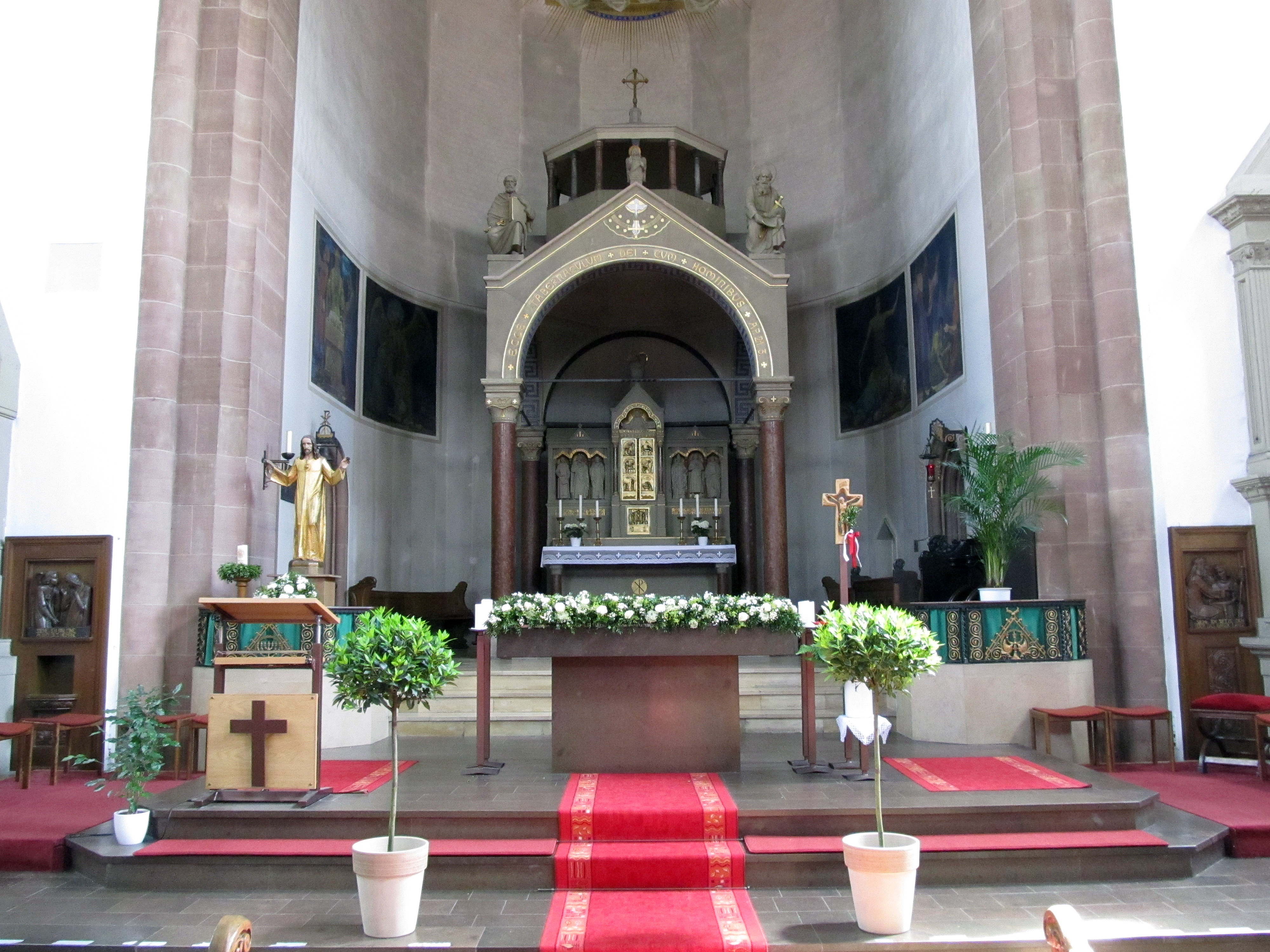 Blick in den Chor der St. Michaelskirche (Homburg, Saarland)